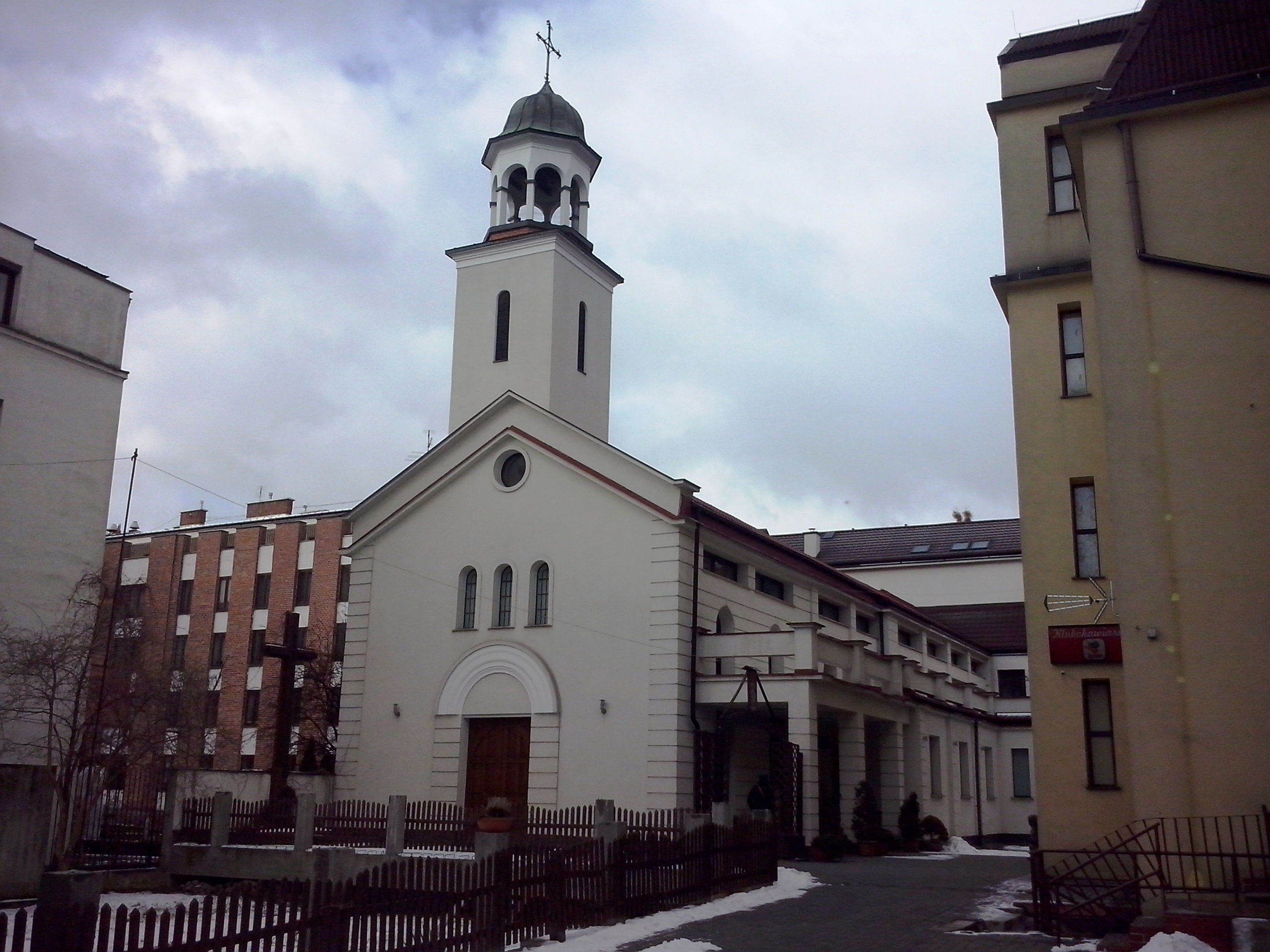 Warszawa - kościół Miłosierdzia Bożego i Św. Faustyny